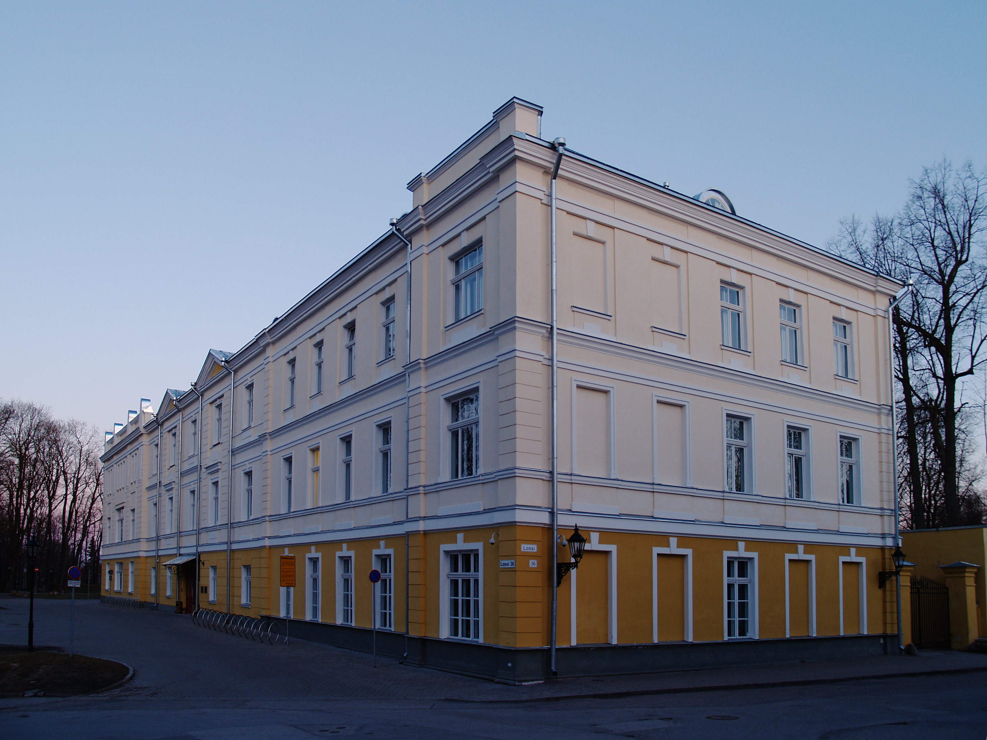 Tartu Ülikooli sotsiaal- ja haridusteaduskonna hoone aadressil Lossi 36.